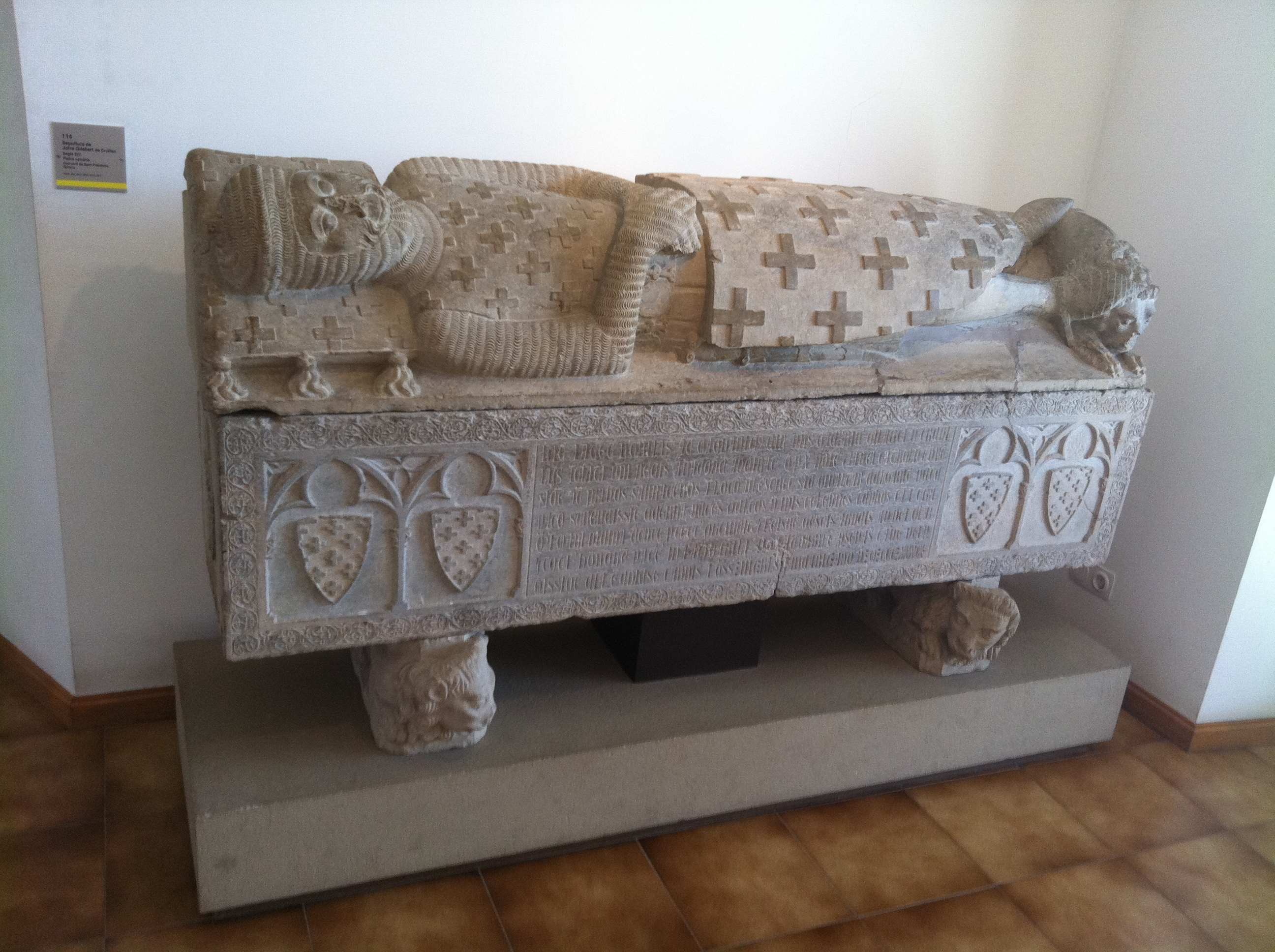 Museu d'Art de Girona - Sepultura de Jofre Gilabert de Cruïlles